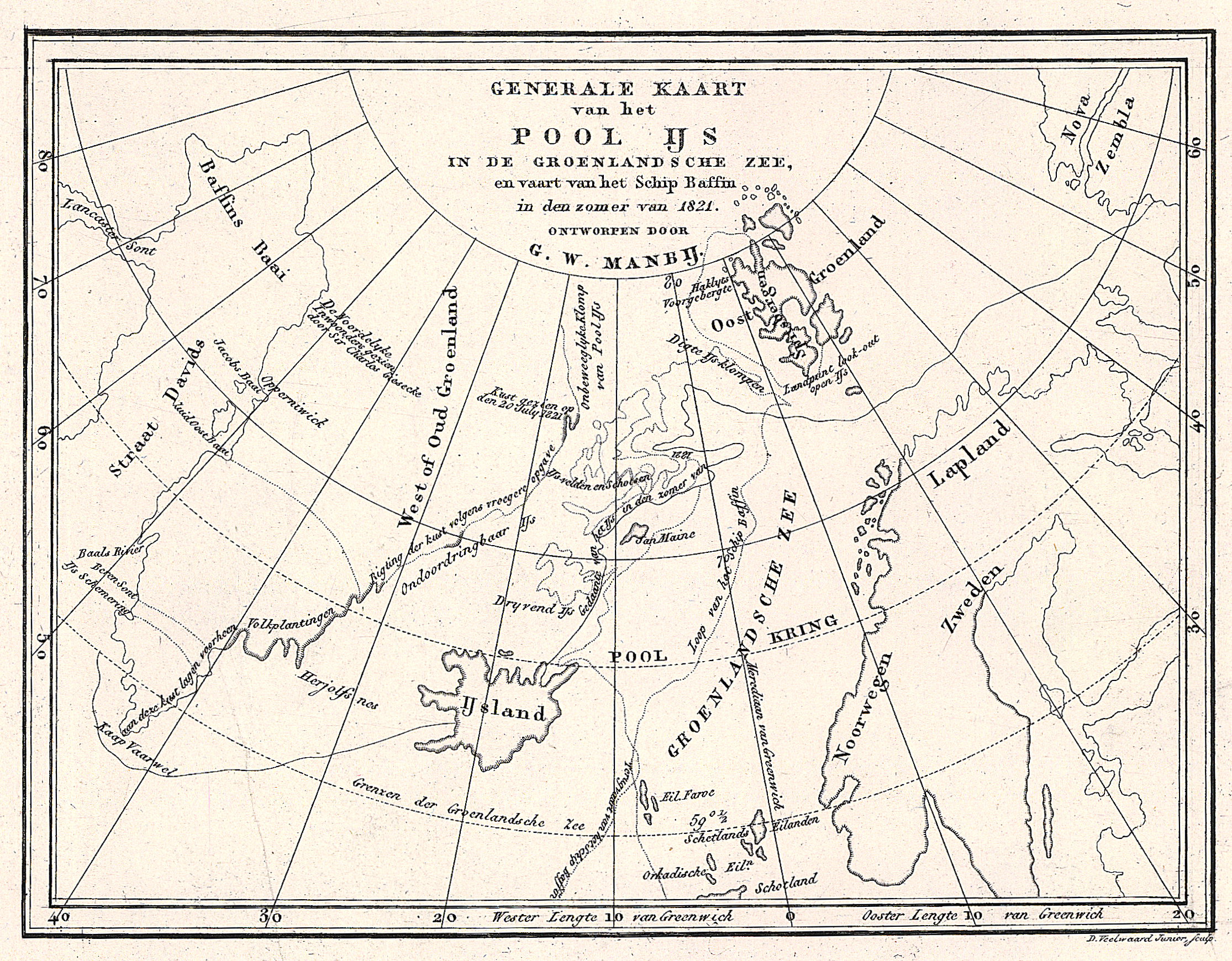 Generale kaart van het pool ĳs in de Groenlandsche Zee, en vaart van het schip Baffin in den zomer van 1821 / ontworpen door G.W. Manbĳ ; D. Veelwaard Junior sculp Schaal ca. 1:24.000.000 Uitgever/Drukker Link Brink en De Vries, Ten, Amsterdam 1 kaart kopergrav 13,5 x 18 cm Ook in: G.W. Manby, Reis naar Groenland, in het jaar 1821. - Amsterdam : Ten Brink en De Vries, 1825